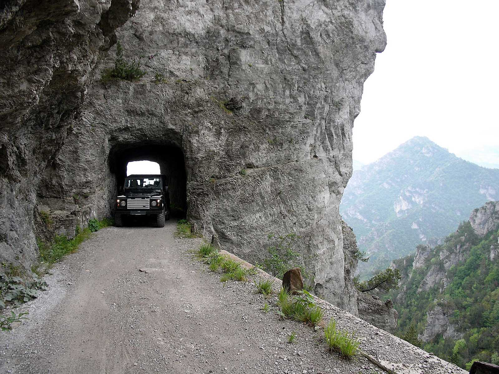 Tremalzo Südauffahrt Tunnel mit Landrover Defender 110